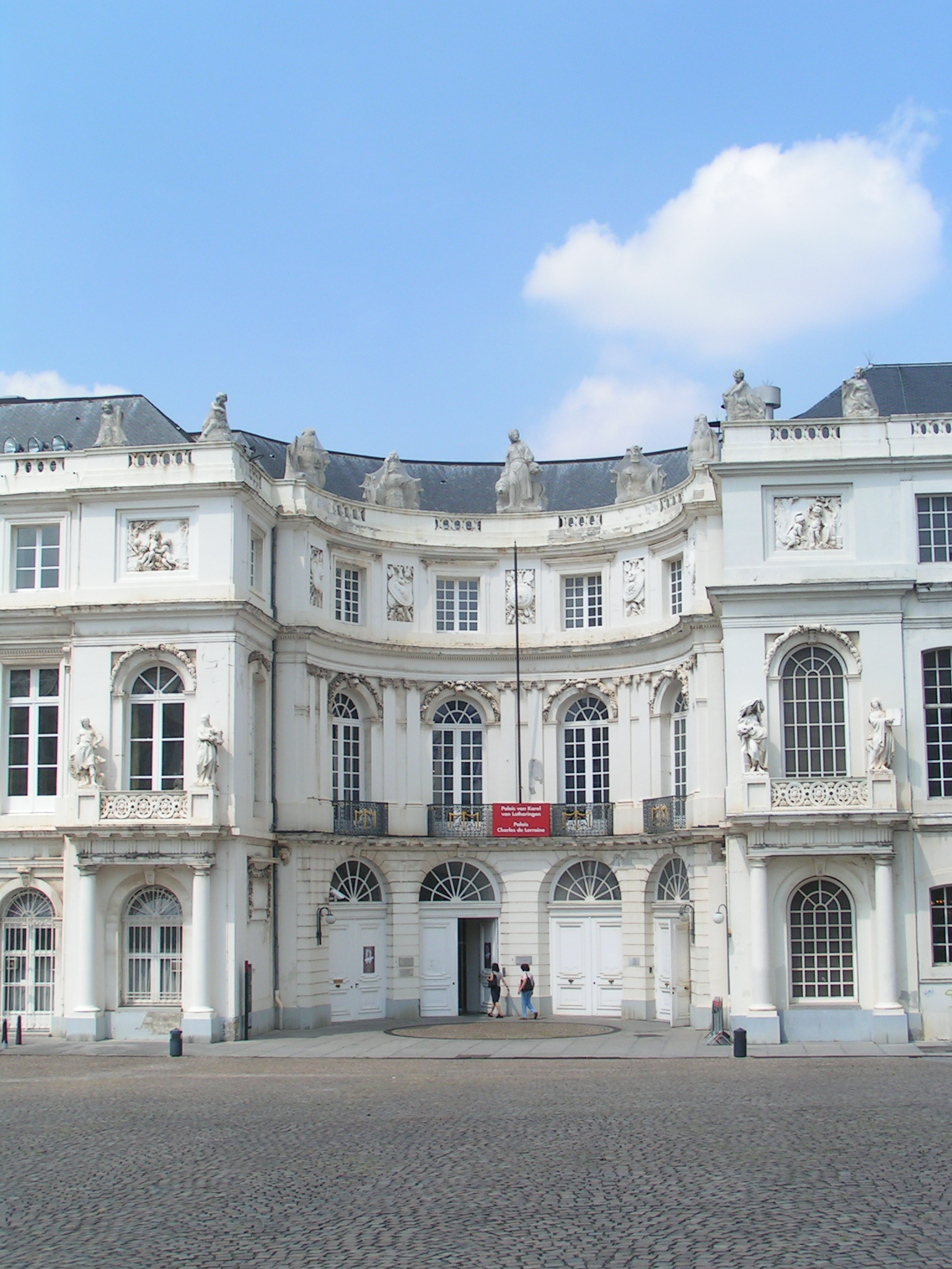 Façade d'entrée du Palais de Charles de Lorraine à Bruxelles, vers 1760.